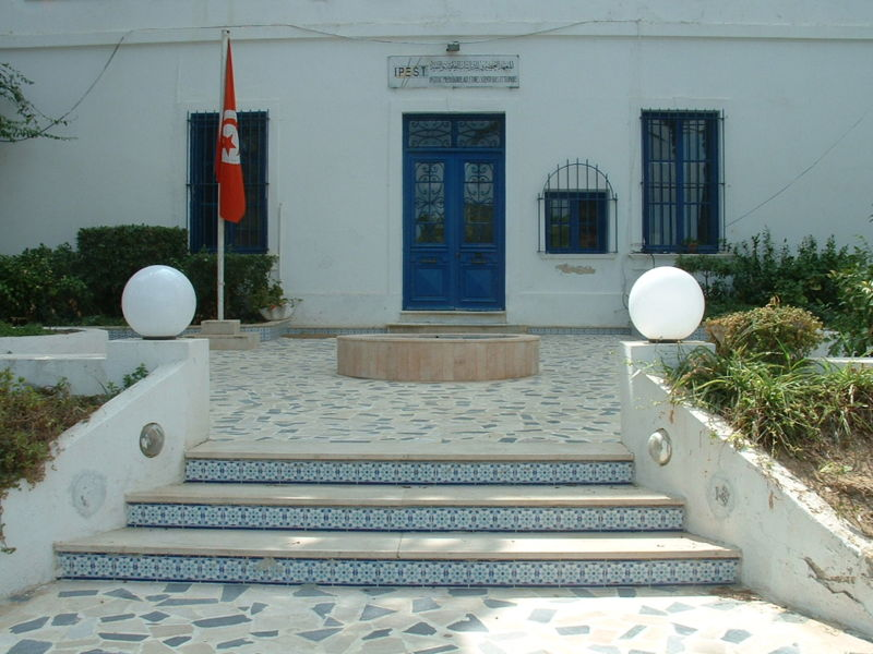 Photographie personnelle prise à La Marsa (Tunisie). Porte d'entrée du bâtiment administratif de l'Institut Préparatoire aux Etudes Scientifiques et Techniques